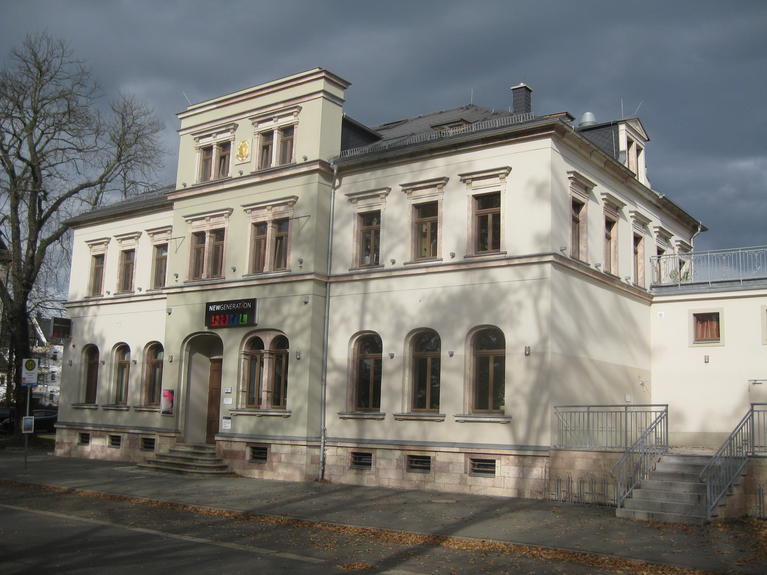 Denkmalgeschütztes Gasthaus in der Augustusburger Straße 167 in Chemnitz-Sonnenberg